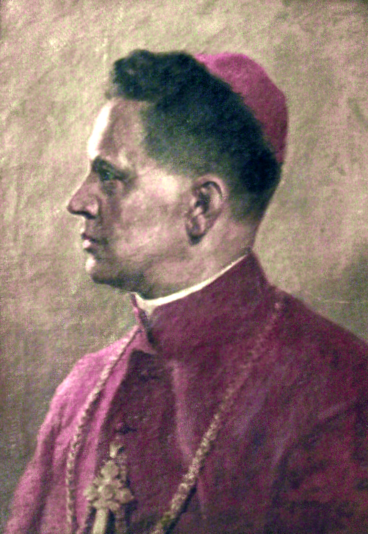 portrait